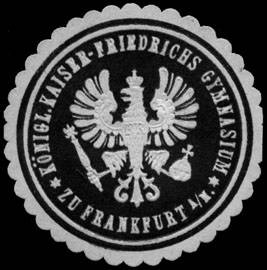 Sealing stamp Title: Königliches Kaiser - Friedrichs Gymnasium zu Frankfurt am Main Description: schwarz, weiß, geprägt Place: Frankfurt / Main size: 4 cm